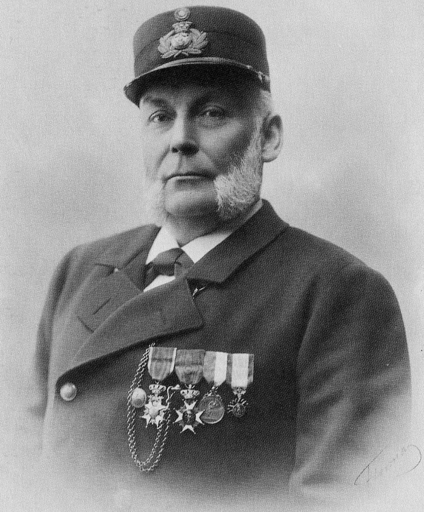 Bruno Hollstén, Stockholms första brandchef